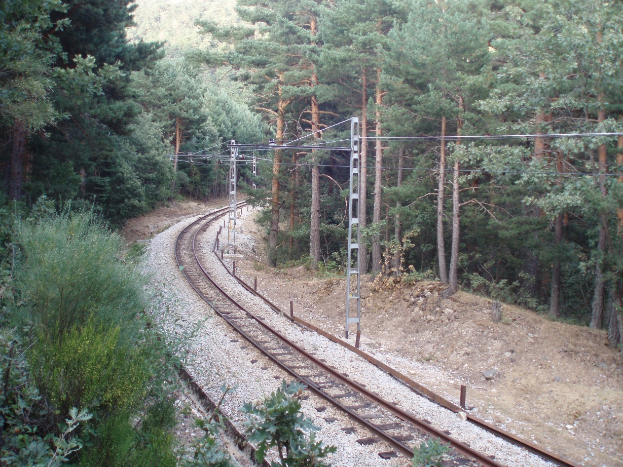 Vías de la Línea C-9 de Cercanías Madrid (España).